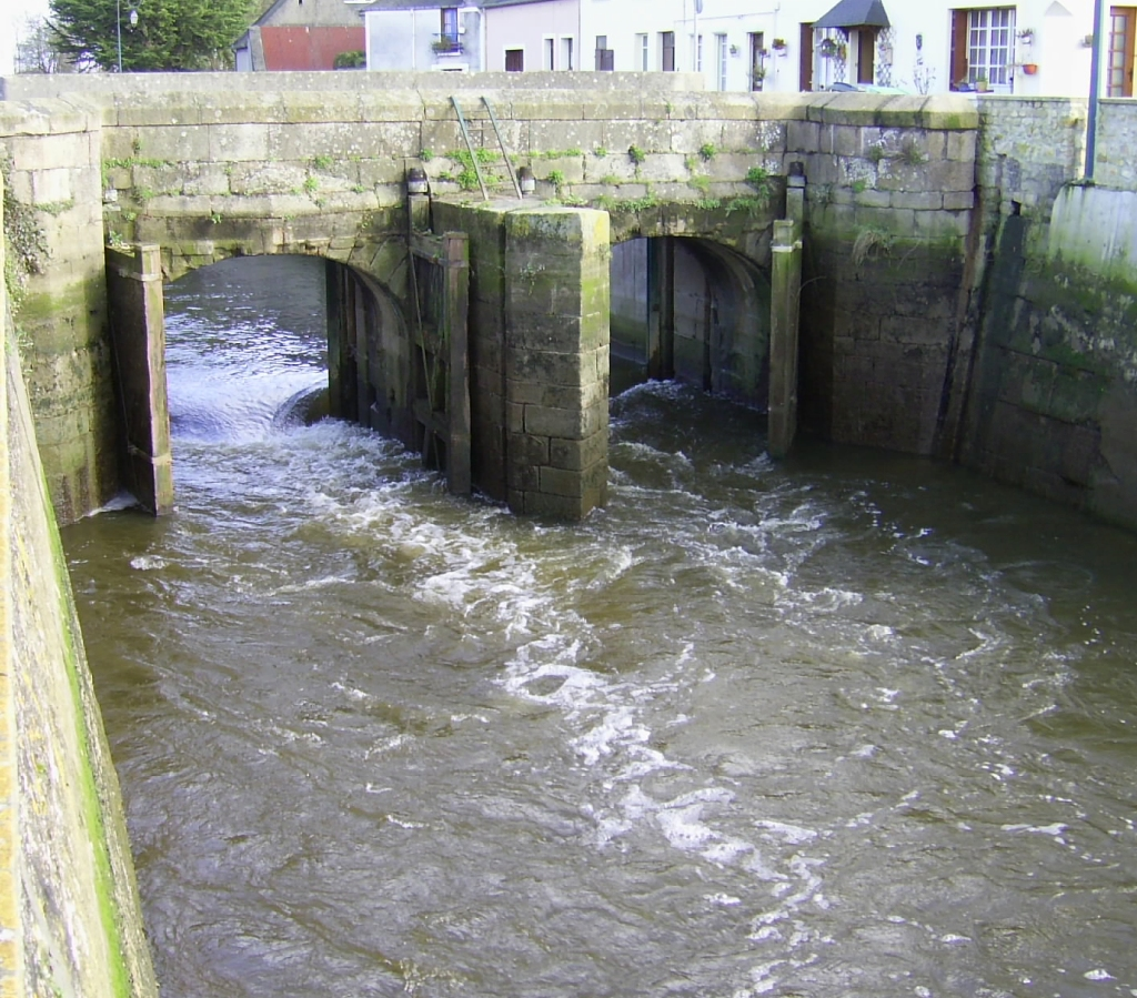 L'Aure avec une "porte à flots" à Isigny sur Mer